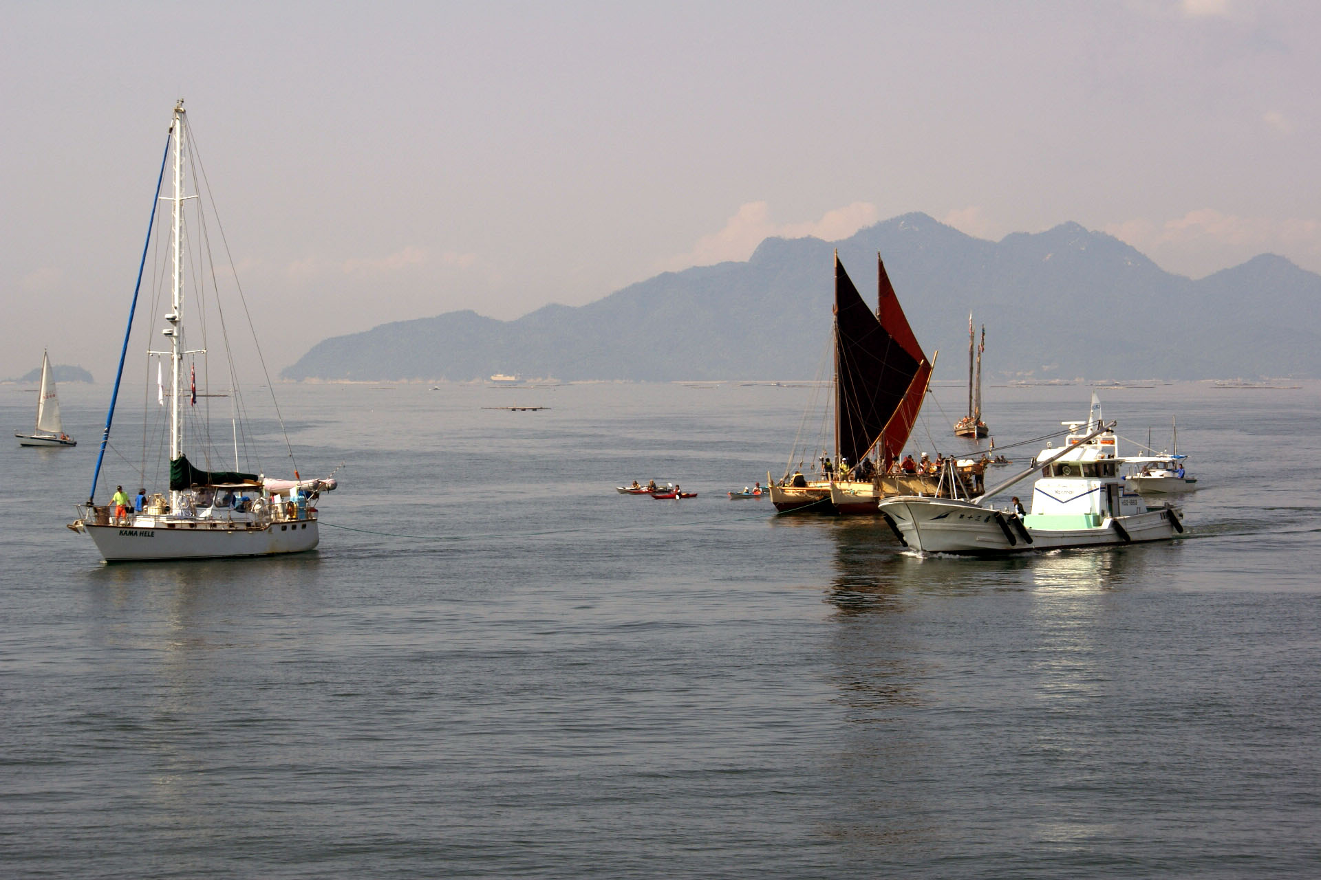 Hokule'a arriving at Kan-non Marina, Hiroshima